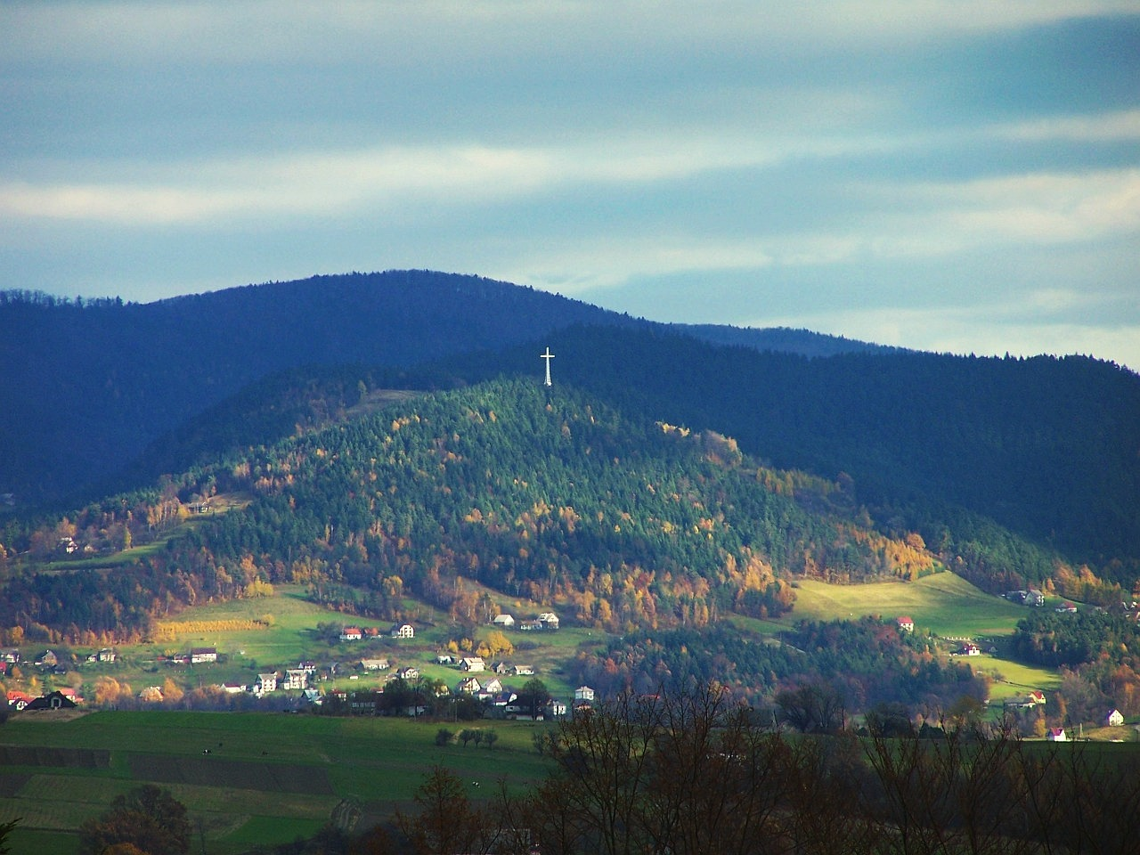 Miejska Góra w Limanowej